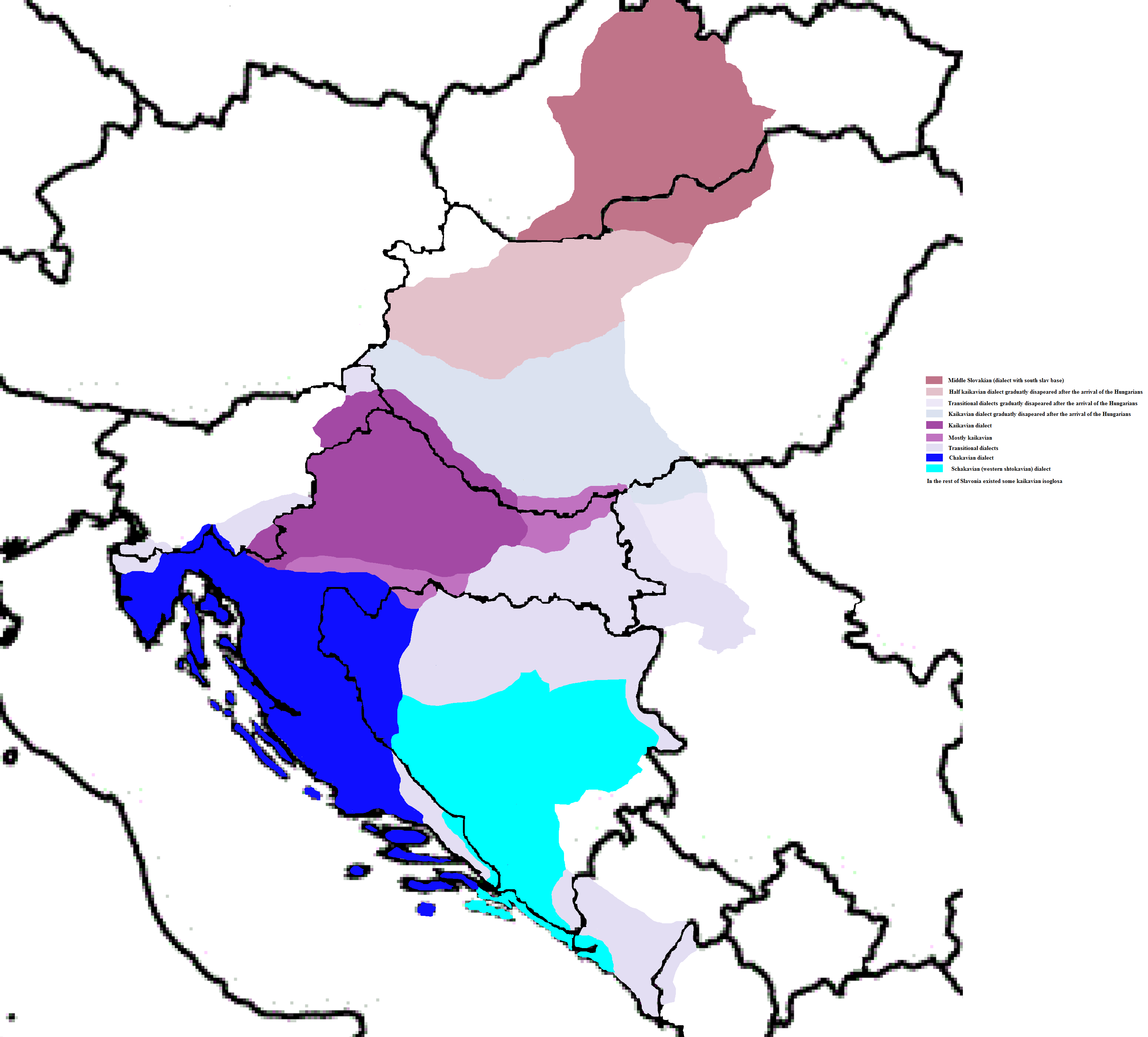 Povjesne granice kajkavskog narječja. Prikazana je veza sa slovačkim srednjim narječjem, koje je podrijetlom južnoslavensko s pojedinim zapadnoslavenskim isoglosa. Prikazan je i vjerojatan gubitak teritorija nakon doseljenja Mađara. Šćakavski govori ostatka slavonije su također sadžravali pojedine kajkavske isoglose, a možda su bili i pretežito kajkavski. Prikazani su i čakavski i šćakavski, odnosno ostala hrvatska narječja, što se i ne spominje u lončarićevom radu; hrcak.srce.hr/file/103265